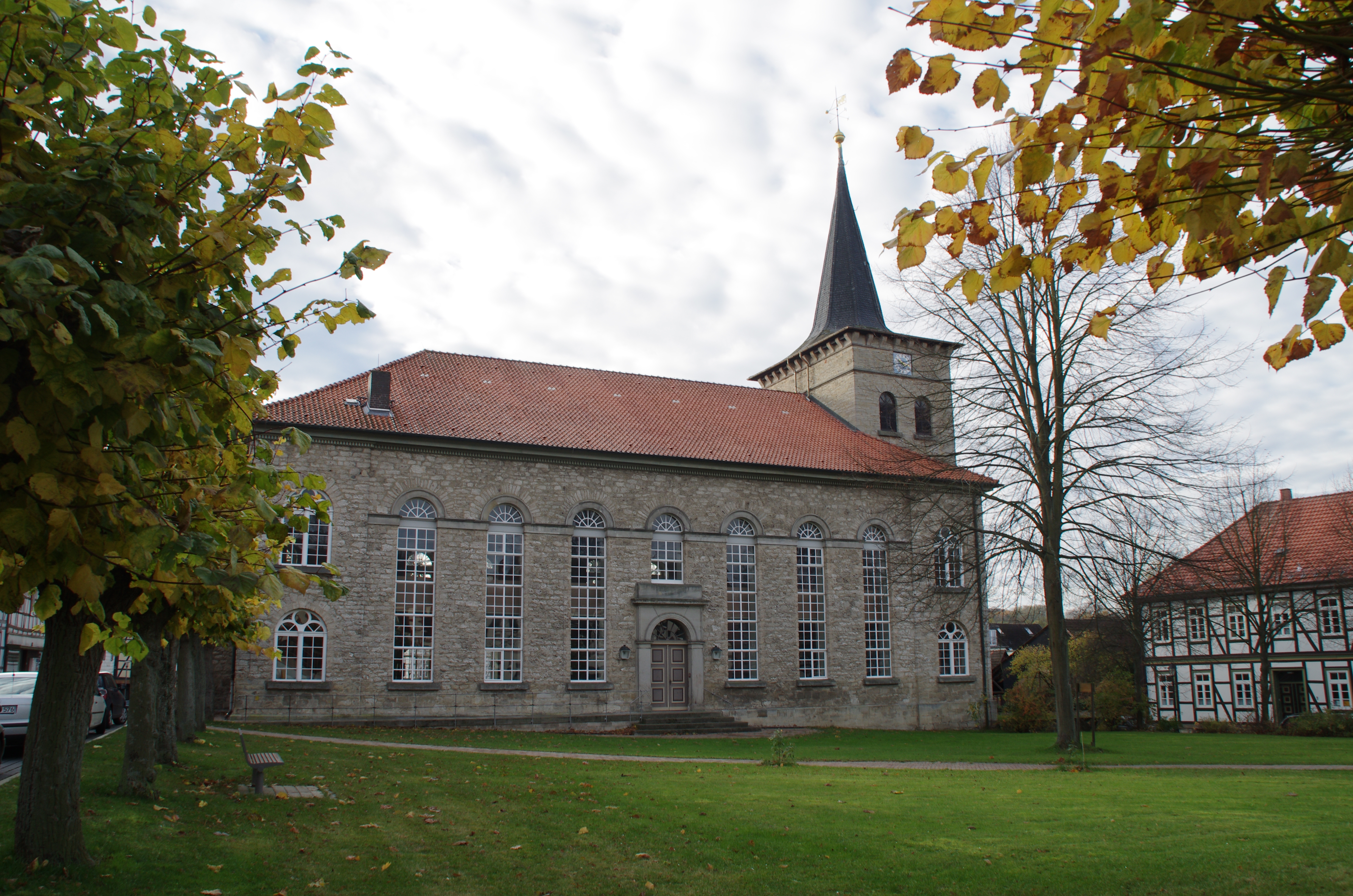 Dransfeld in Niedersachsen. Die Kirche von Norden aus.